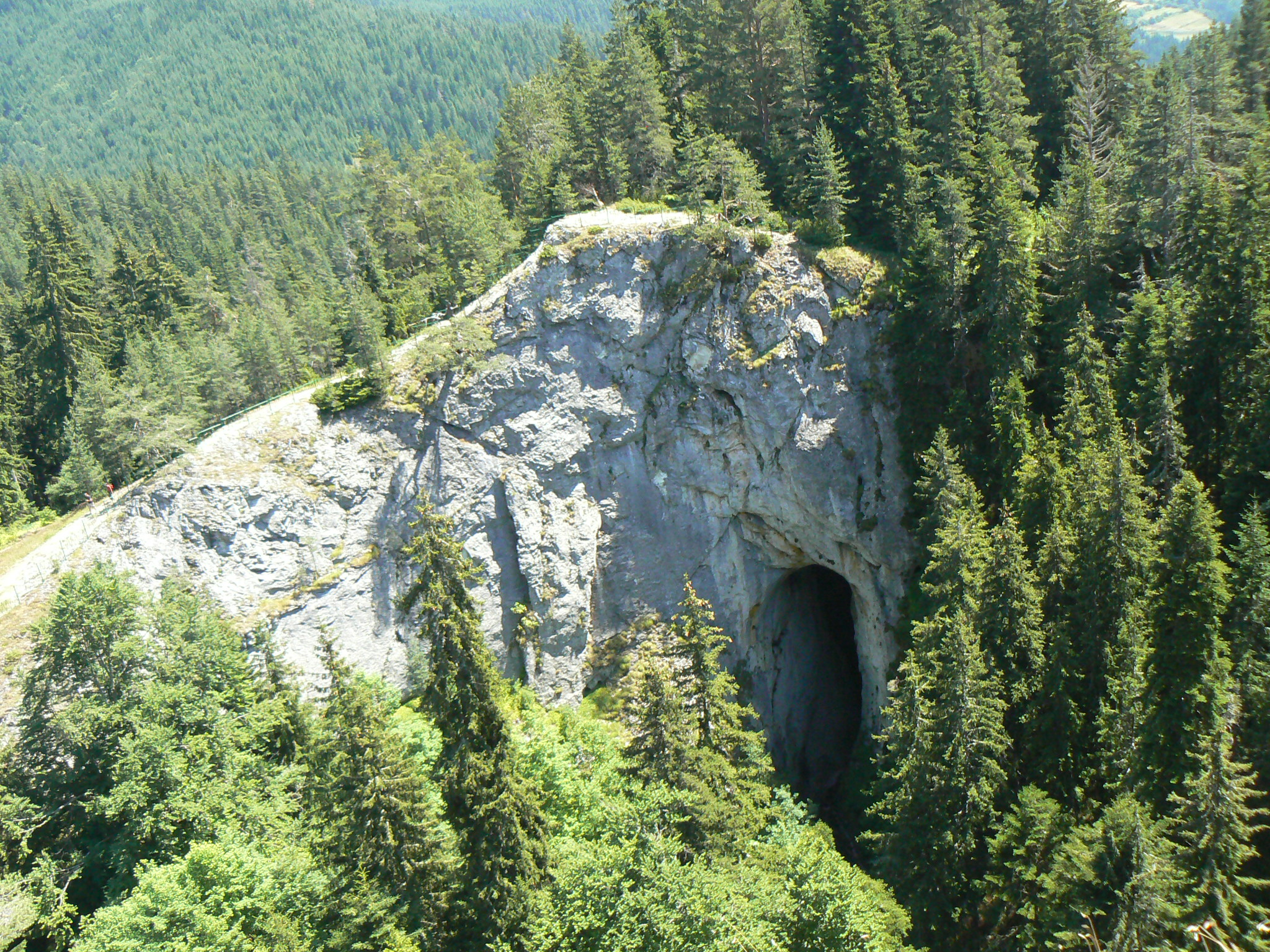 Natural rock phenomenon the Wonderful Bridges in the Rhodope mountain, Bulgaria - view to the small bridge. Природен скален феномен Скалните мостове в Родопа планина, България - поглед към малкия мост.